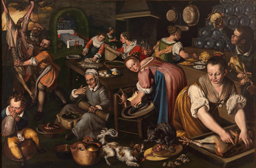 Cucinatitle QS:P1476,it:"Cucina" label QS:Lit,"Cucina"